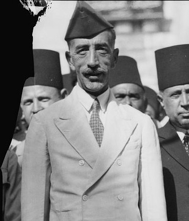 King Faisal I of Irak.